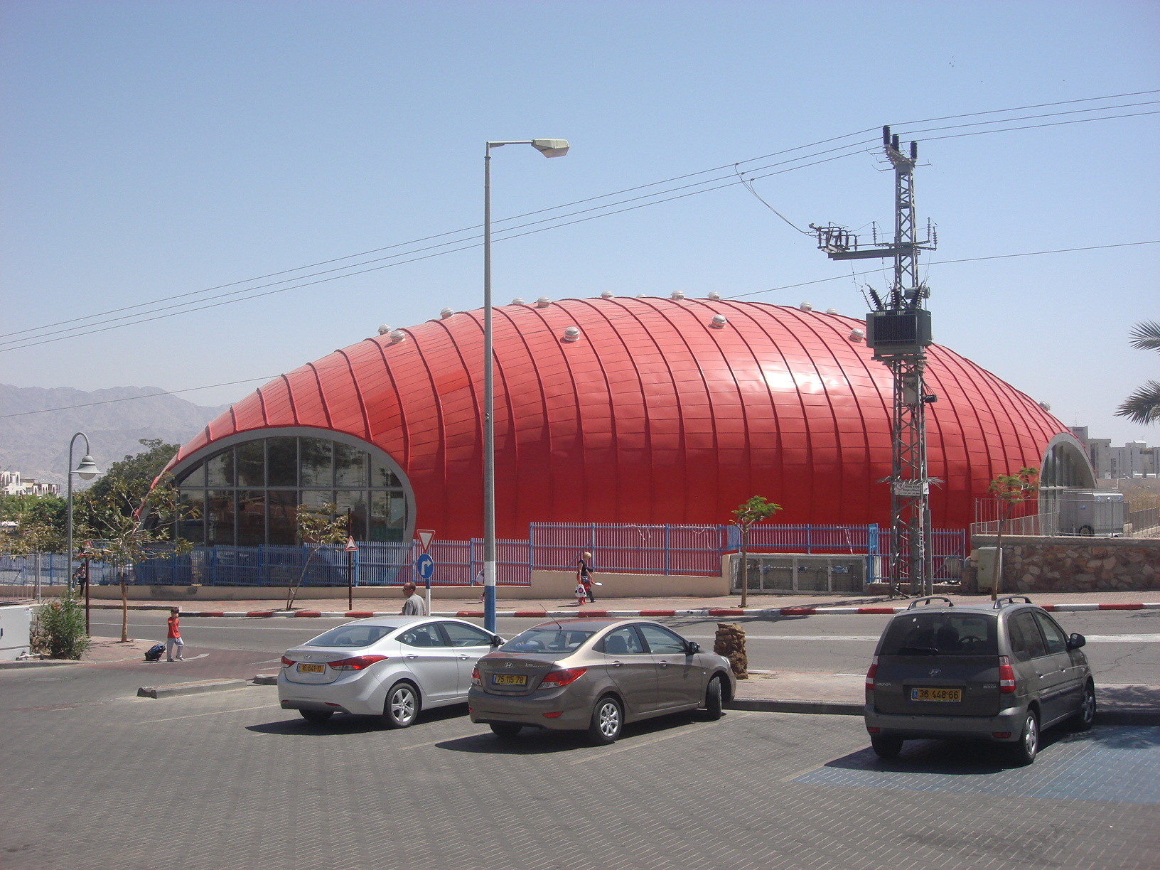 מרכז ספורט באילת